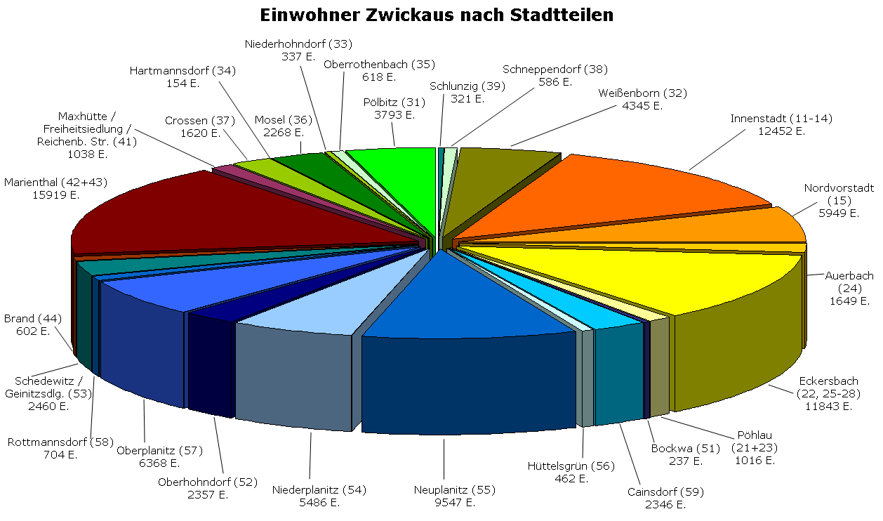 Einwohner Zwickaus nach Stadtteilen (xx) geordnet, Einwohnerzahlen: Stadt Zwickau - Stadtentwicklungskonzept 2020